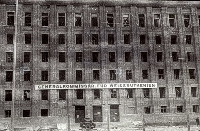 Генеральны камісарыят «Беларусь» у будынку ЦК КПБ